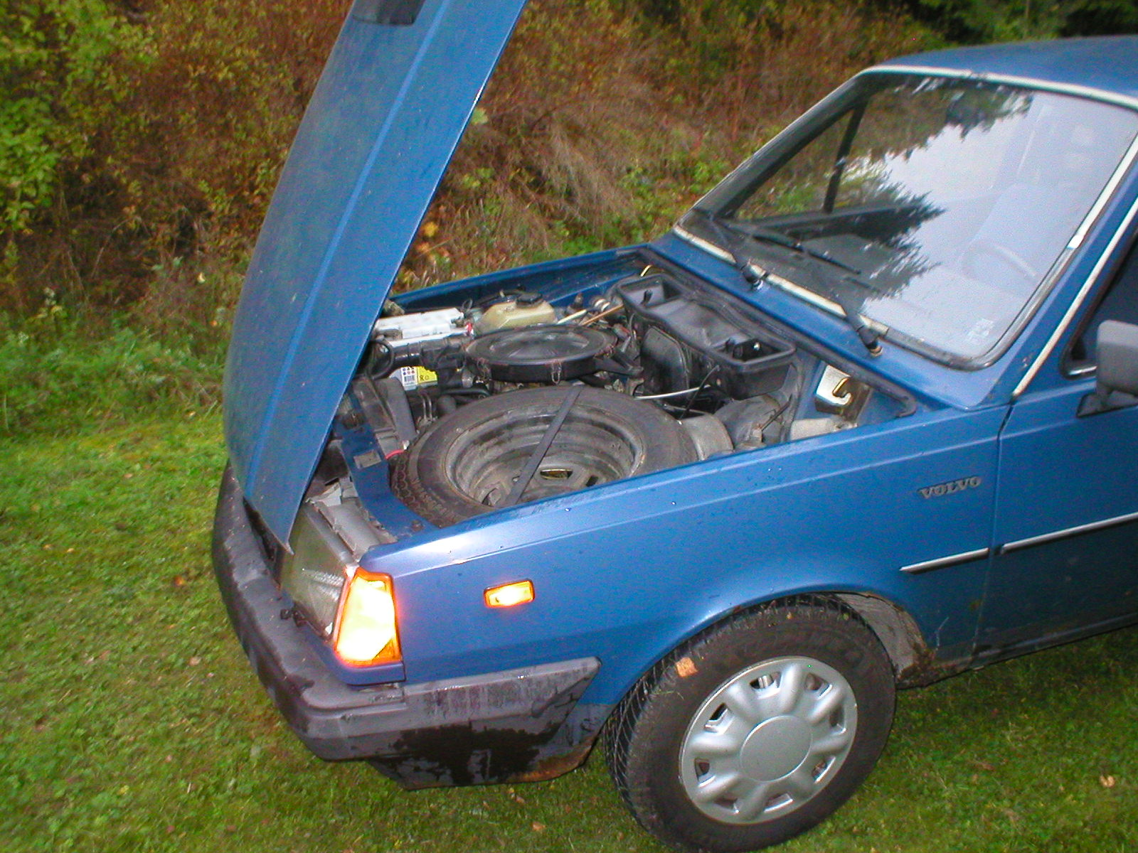 Volvo 340 1983 motorutrymme.